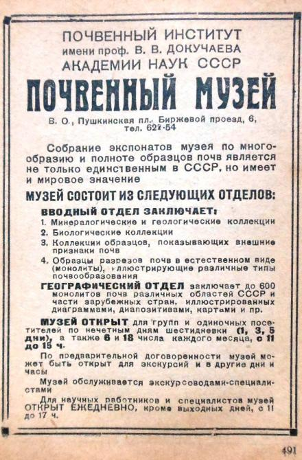 «Ленинград. Путеводитель». — Лениздат, 1940 с.491 - реклама